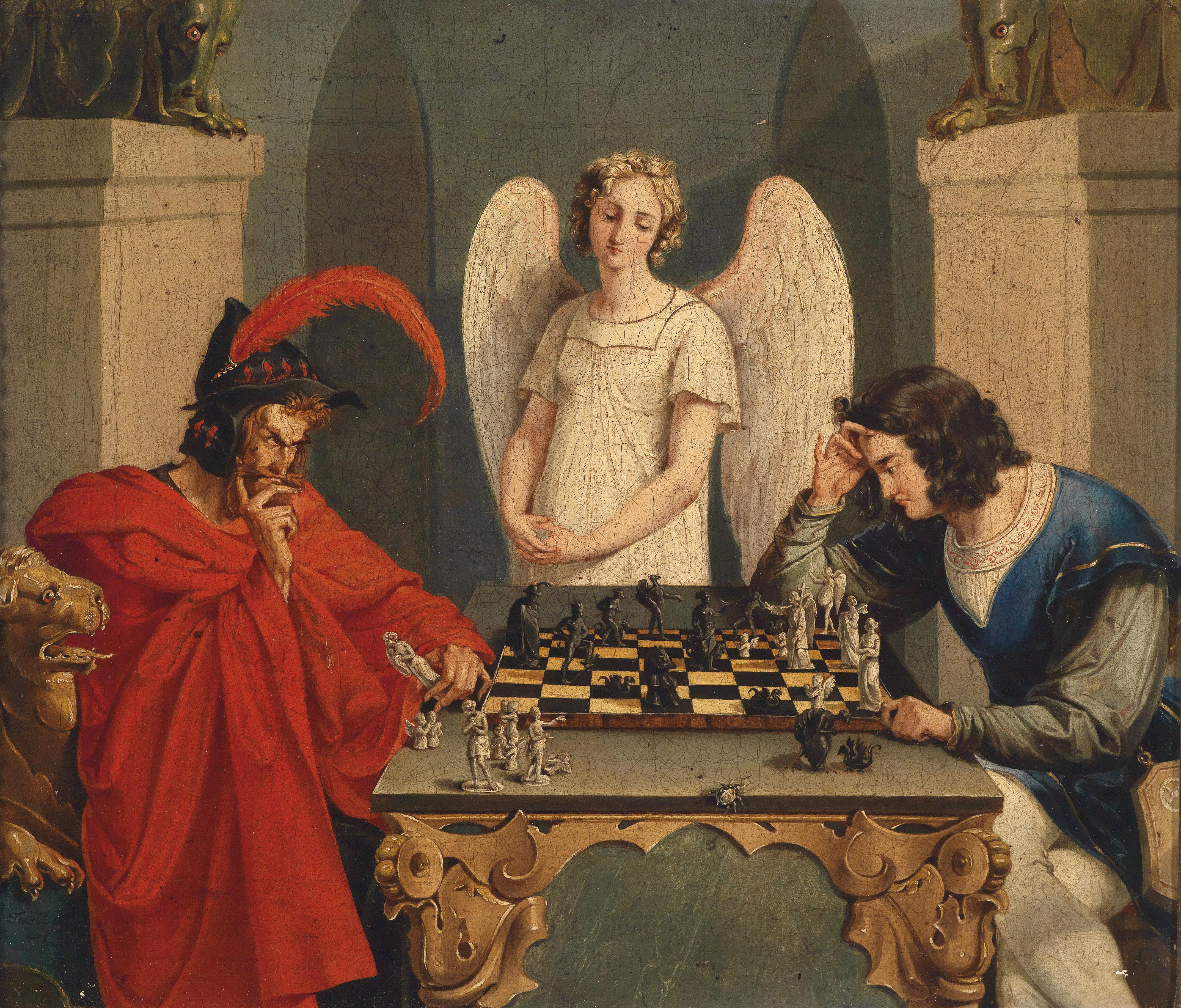 Faust und Mephisto beim Schachspiel, Öl auf Leinwand, 29 x 34 cm